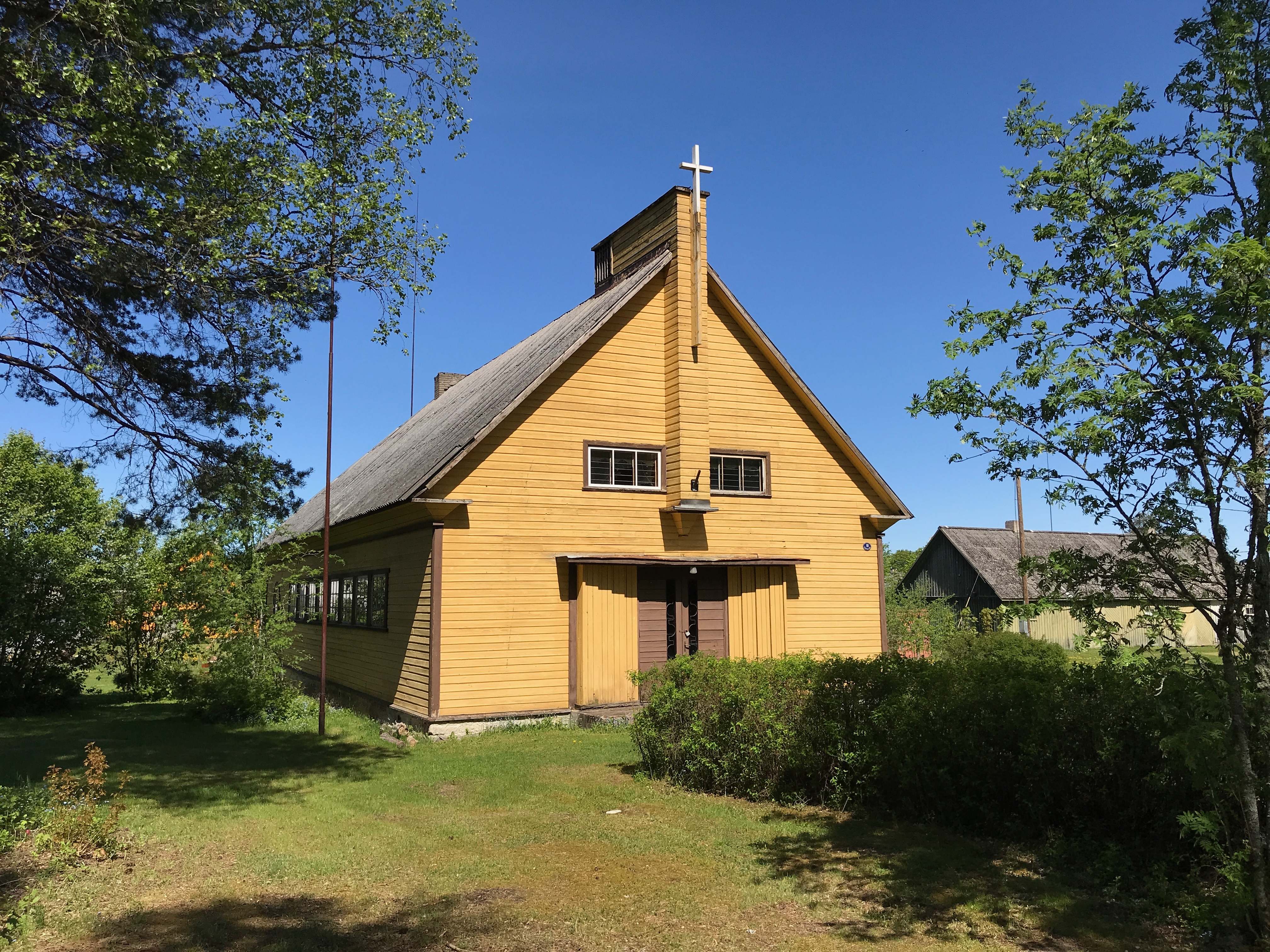 Kuusalu vennastekoguduse palvemaja